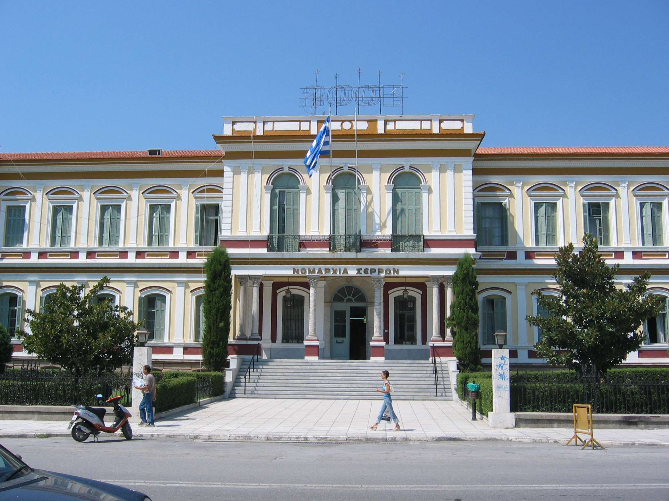 La préfecture de Serrès, Grèce